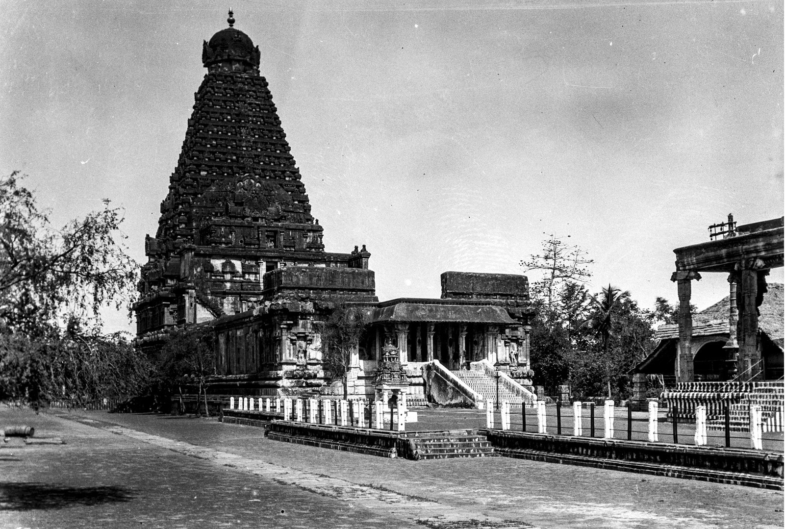 Немецкая этнографическая экспедиция Эгона фон Эйкштедта. 1926-1929 гг. Главный корпус индуистского храма Капалишварар.